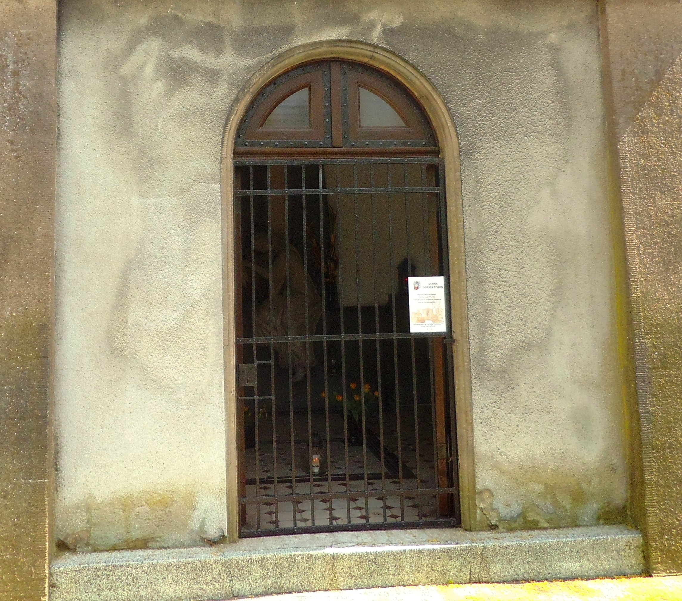 Kaplica grobowa rodziny Jaugschów w Toruniu